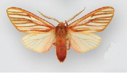 Pseudohemihyalea fallaciosa male